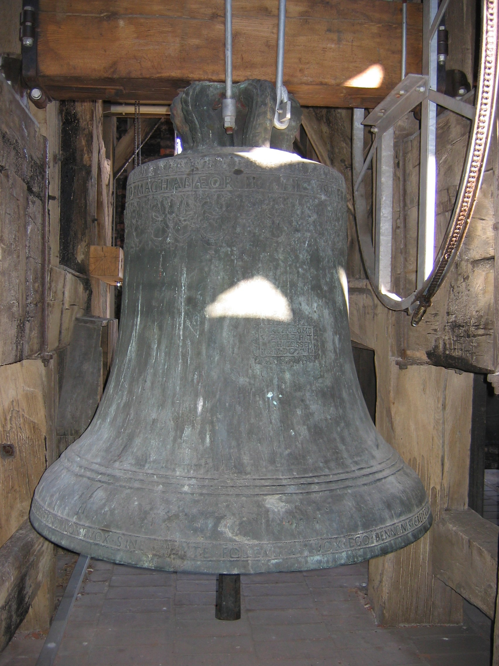 St.-Benno-Glocke (d′) im Frauendom zu München